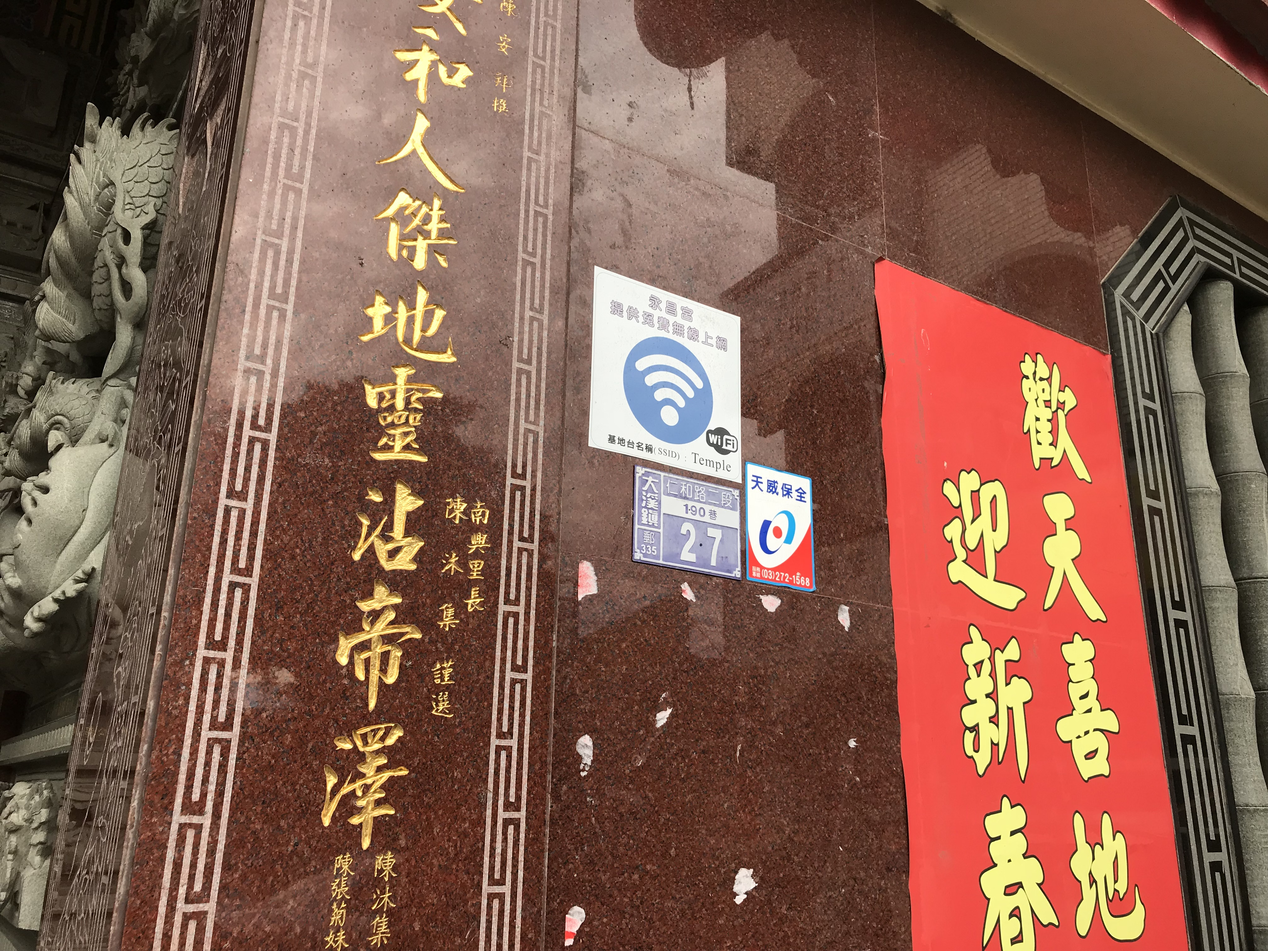 中文（台灣）: 大溪永昌宮門牌